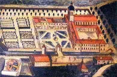 Kloster Bonnevaux bei Vienne, Gemälde 1750